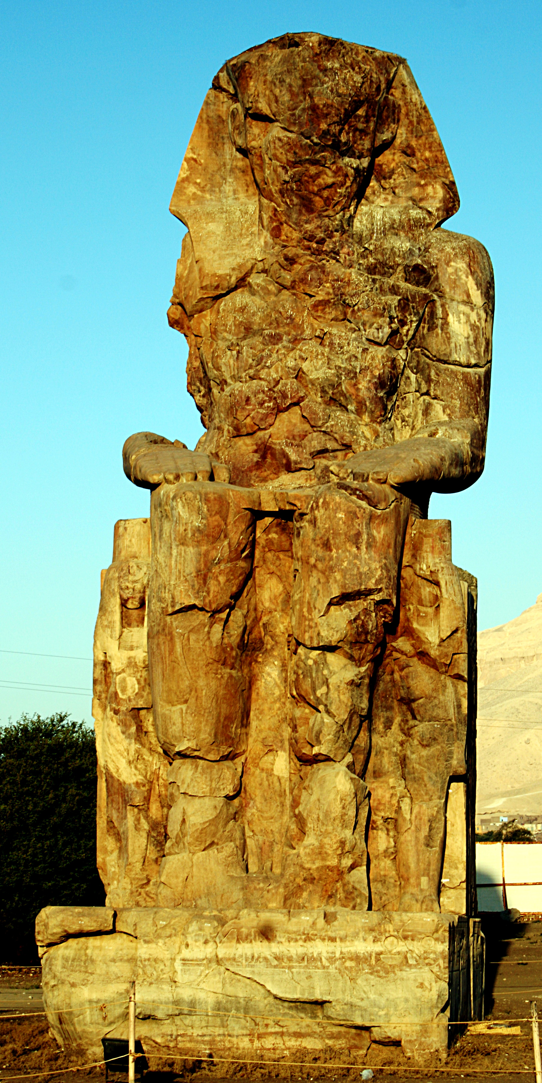 Memnonkolosse